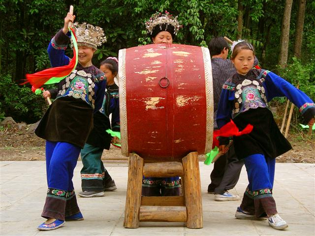 Foto: Tor Svensson